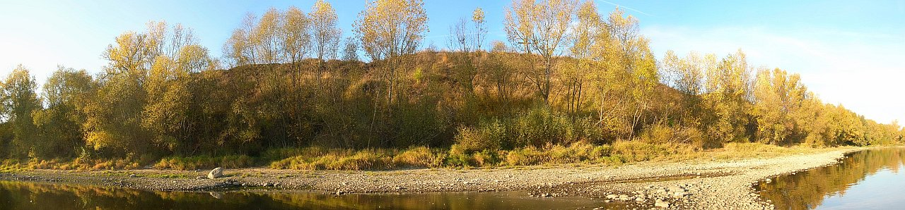 Grodzisko Wyszogród w Bydgoszczy - jesienna panorama od strony Wisły